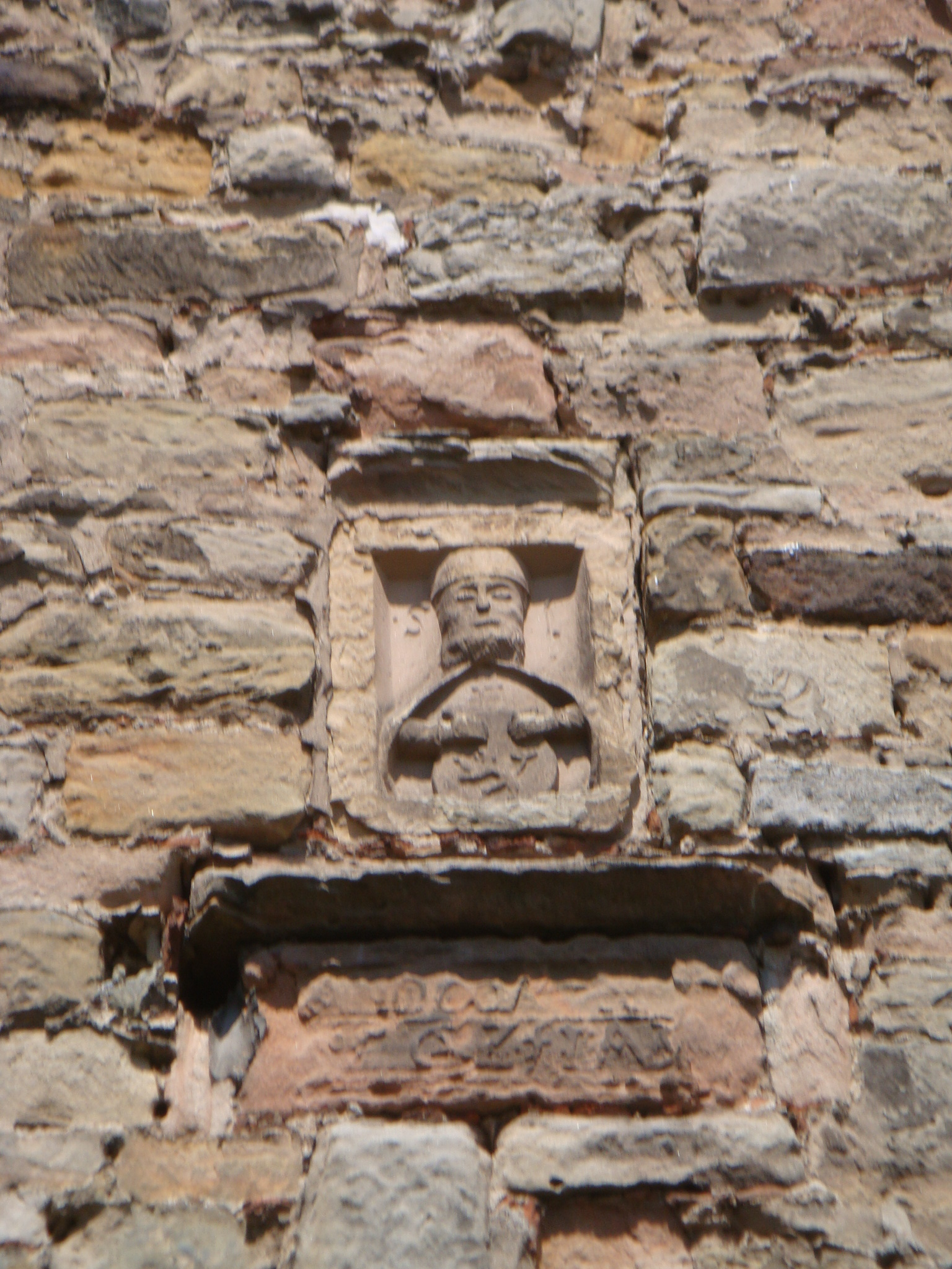 Burgwenden Steinrelief des Hl. Laurentius an der Außenmauer der Kirche